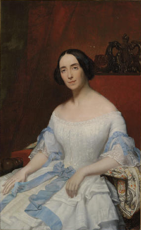 Helena Oppenheim (1799-1880), baronne Fould